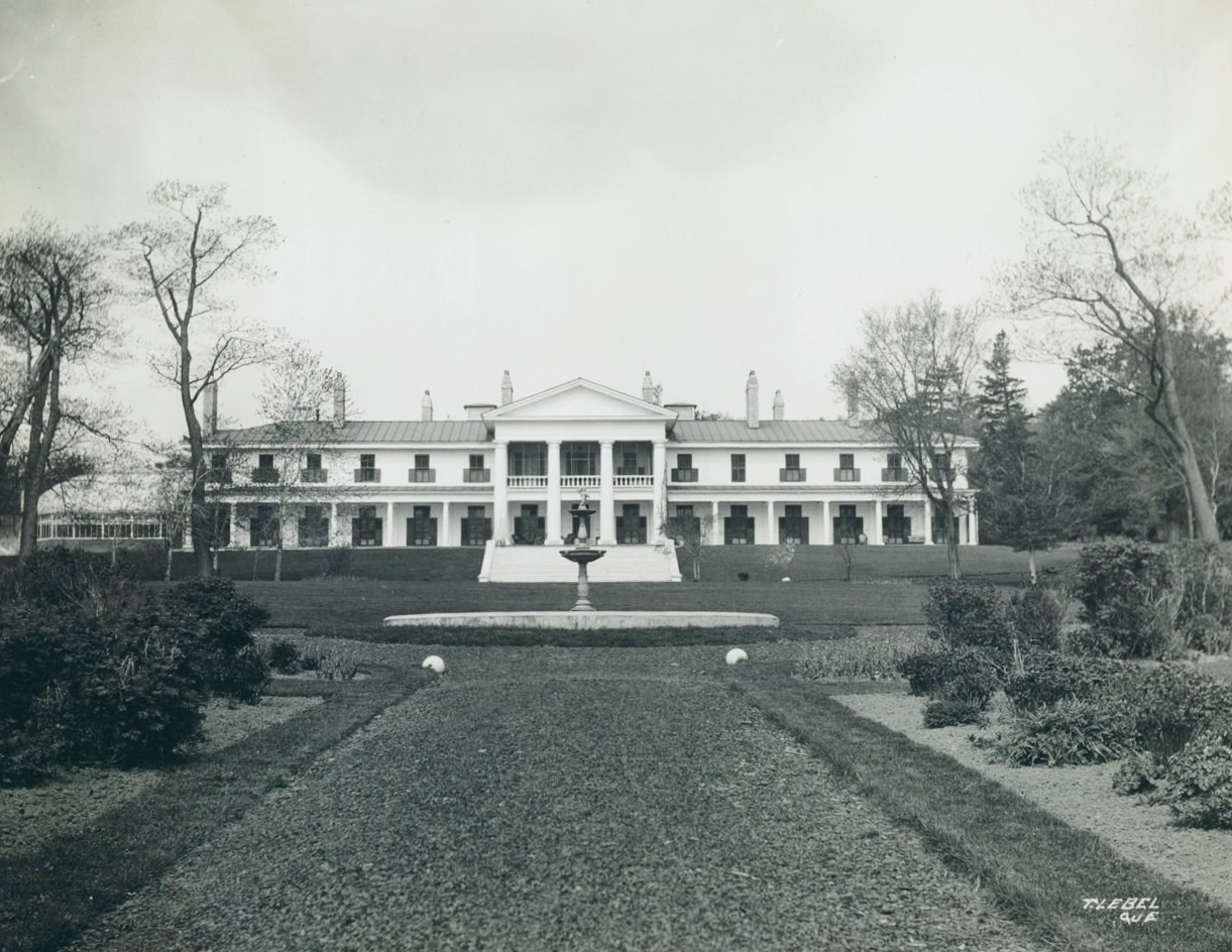 Le domaine Spencer Wood, vers 1930. (Sillery – Chemin Saint-Louis – Spencer Wood – Résidence, Thaddée Lebel, vers 1930, Collection initiale, P600,S6,D2,P3,BANQ)